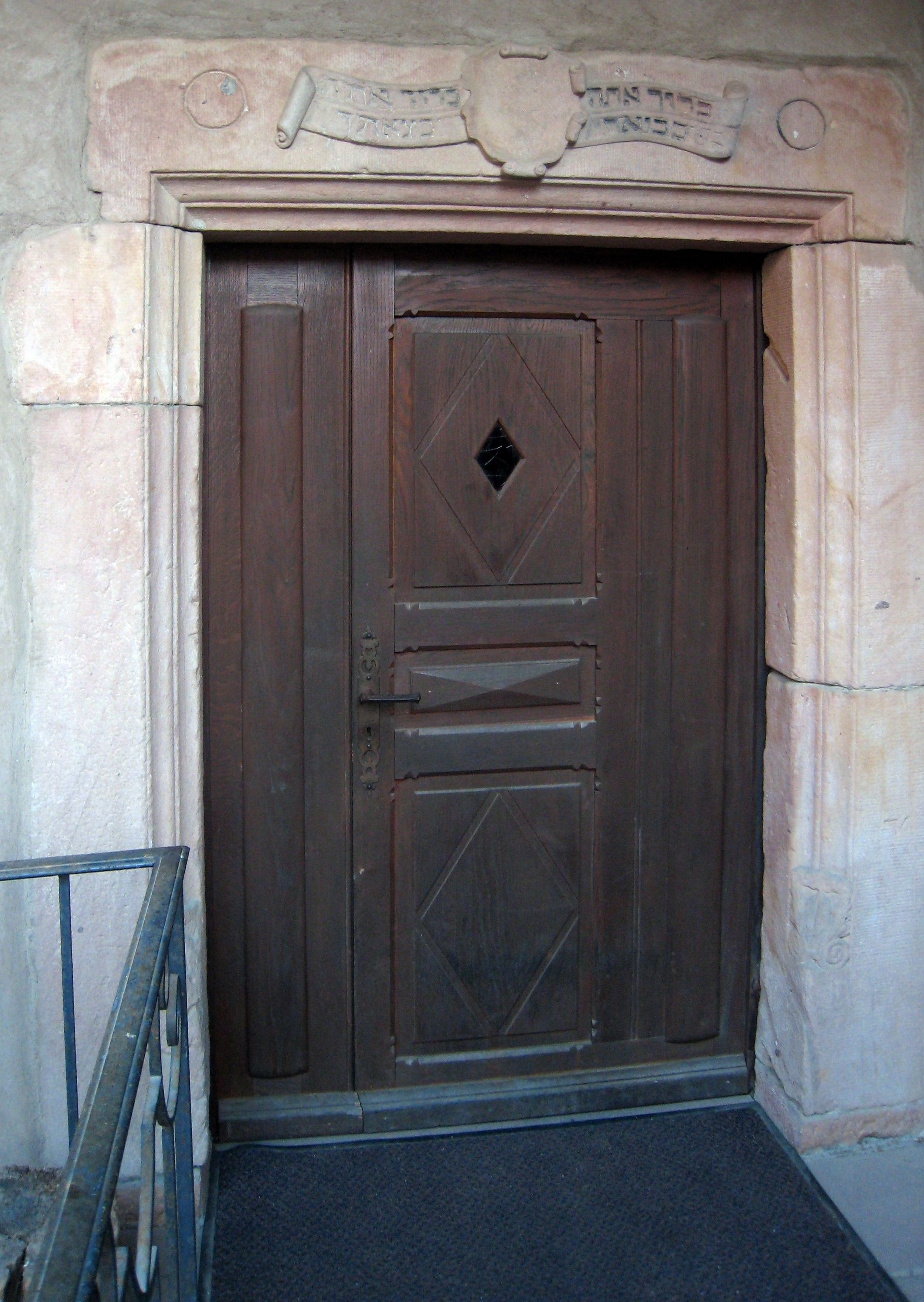 Bergheim Porte de la maison du Kotsen avec inscription hébraïque du XVIe siècle